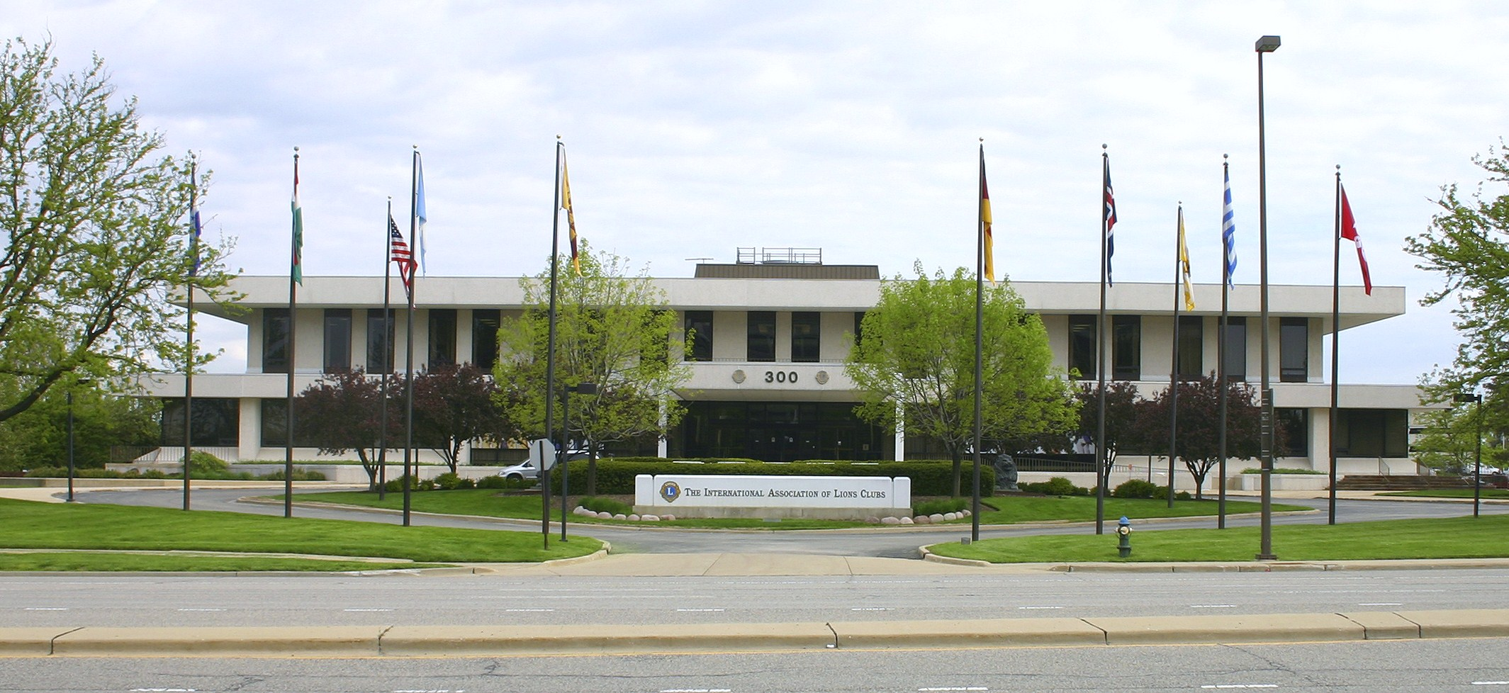 Lions Clubs Internationals hovedkontor i Oak Brook, Chicago